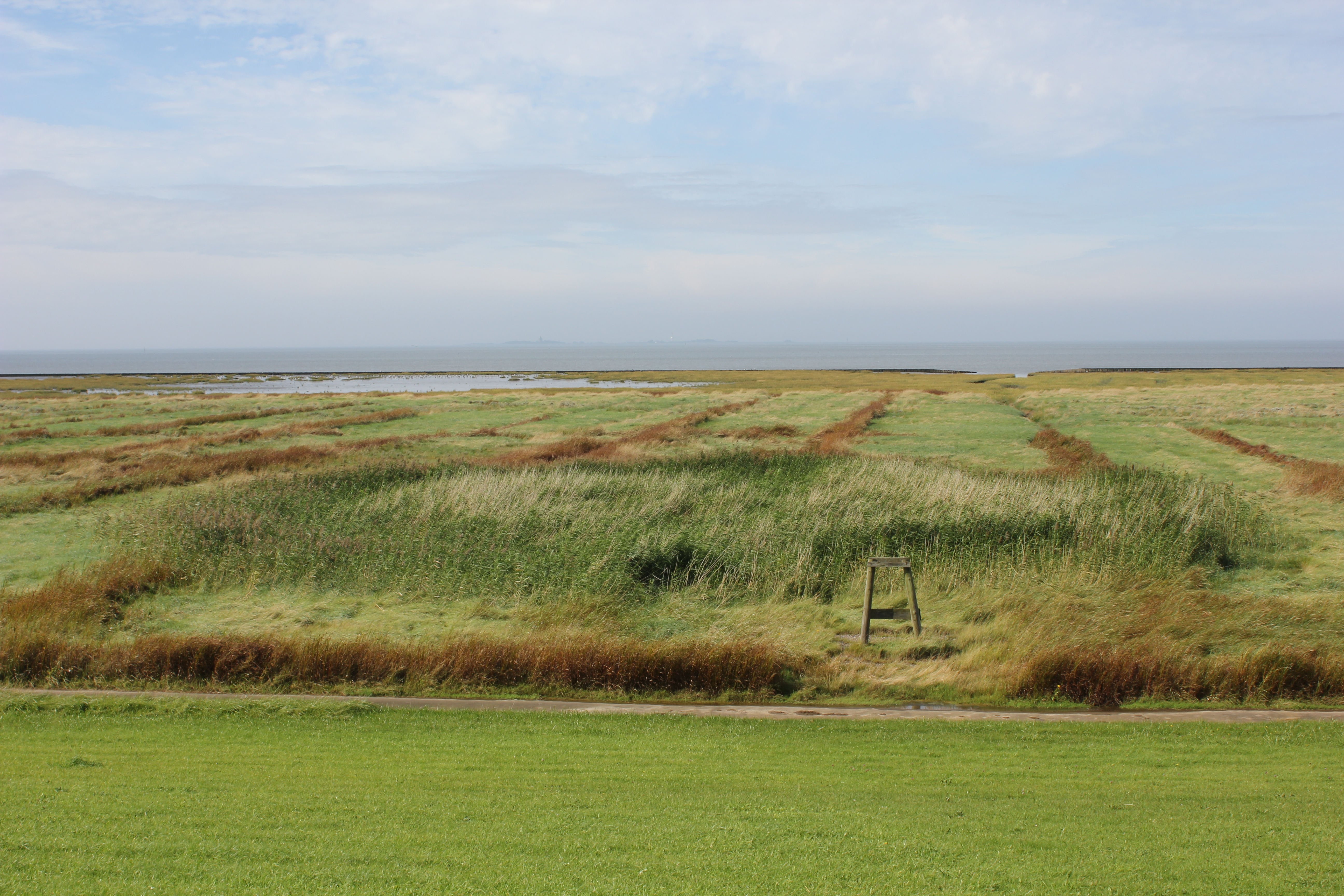 Schilf (Pragmites communis) im Nordseewatt zwischen Sahlenburg und Duhnen als Zeigerpflanzen für Süsswasserquellen im Watt; Cuxhaven, Nationalpark Niedersächsisches Wattenmeer.